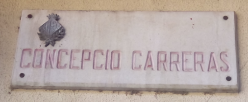 Placa del carrer Concepció Carreras, a Olot, situat prop de la Font de Sant Roc.